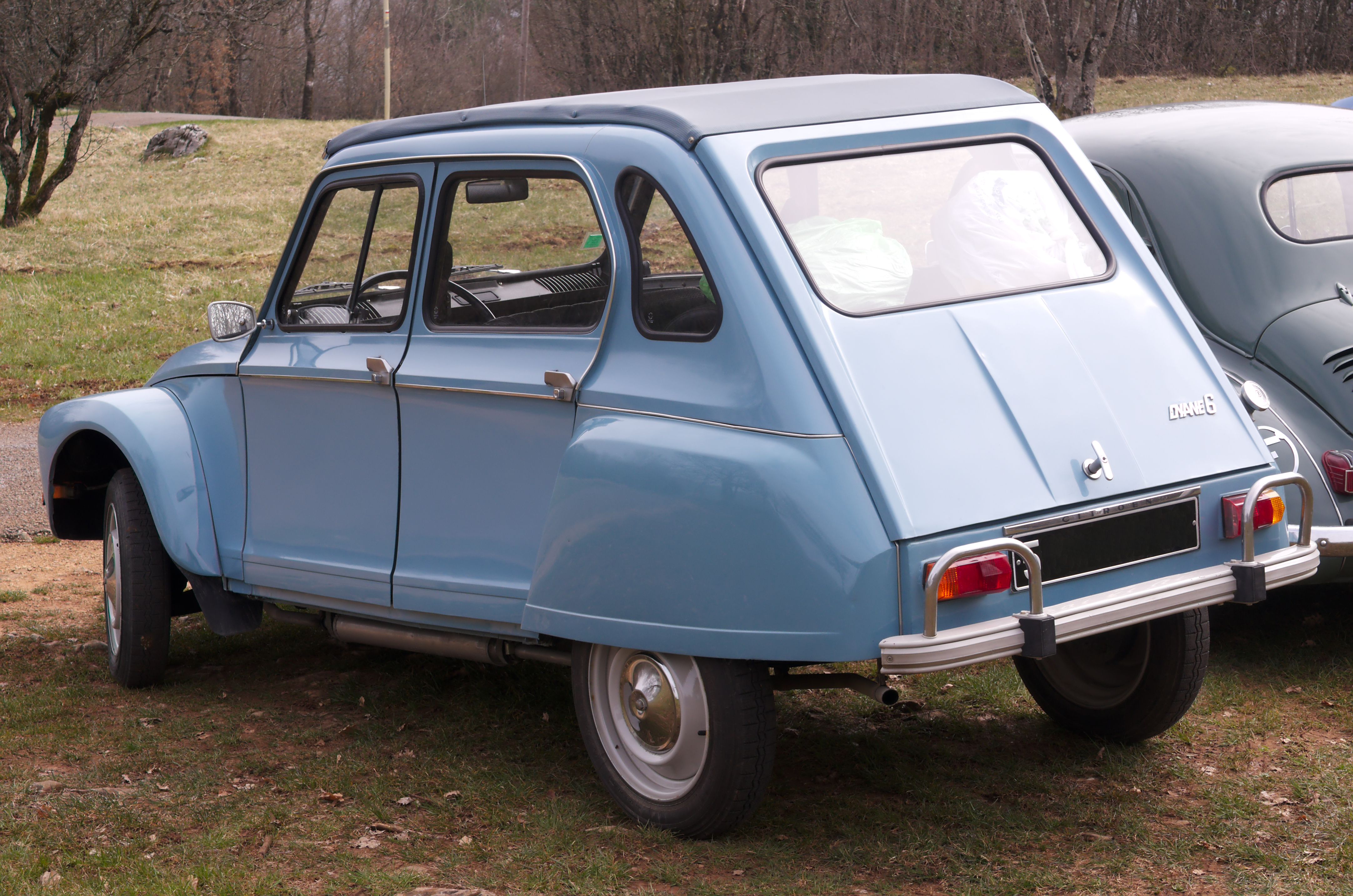 Sortie Soupapes dégrippées 07-04-2013 - Citroen Diane 6